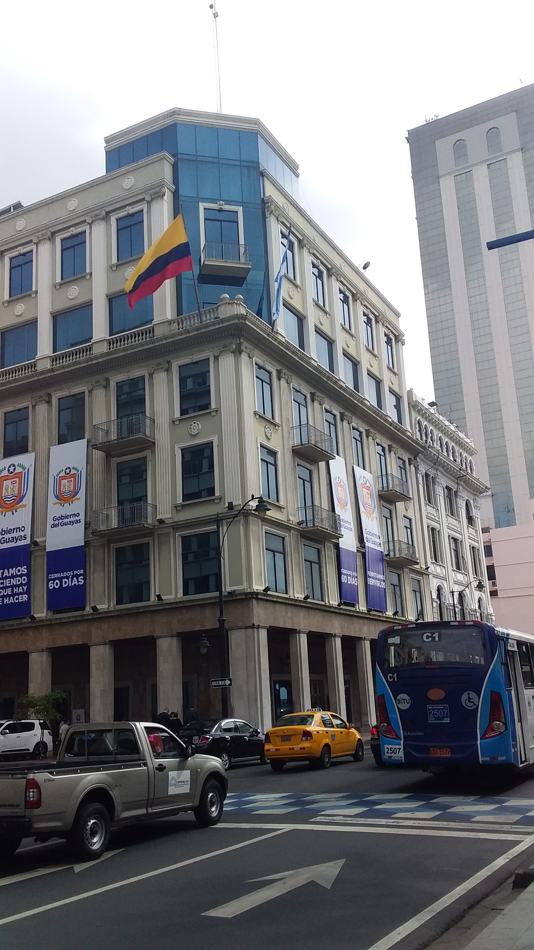 Sede de la Prefectura del Guayas durante los 60 primeros días de la administración de Carlos Luis Morales